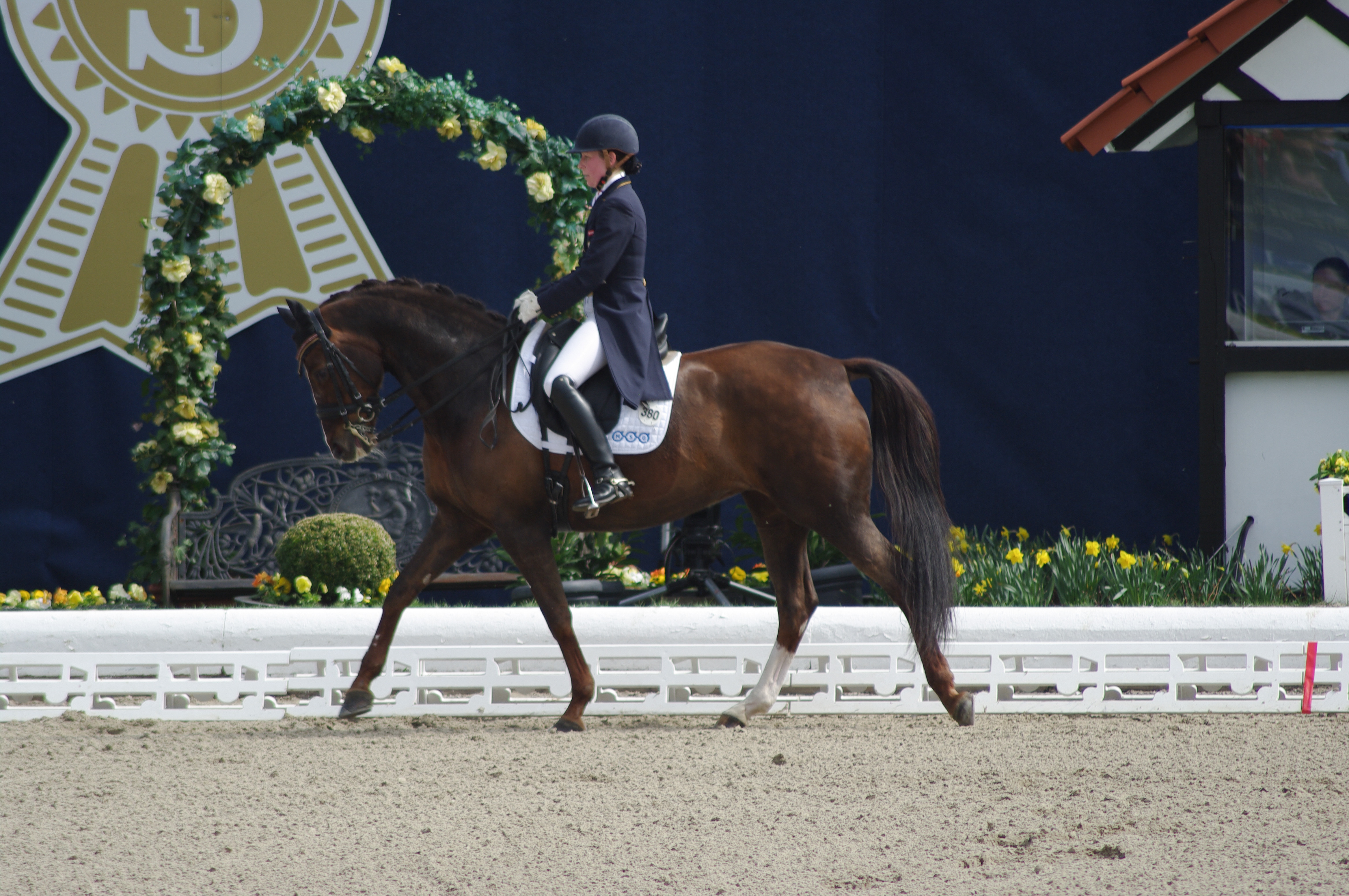 Horses & Dreams 2013: Nr. 6 CDI4* FEI Grand Prix Kür (Preis der Firma Ullrich Equine international GmbH - "in Memoriam George Theodorescu") Karin Kosak mit "Lucy's Day 2"